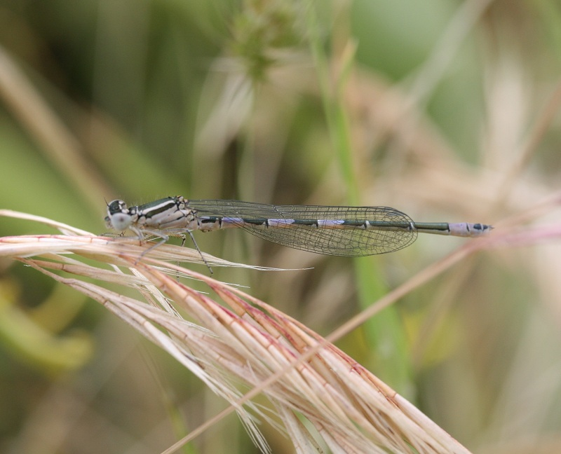 Coenagrion caerulescens, male. Location:Italy - San Giovanni Suergiu (comuni)